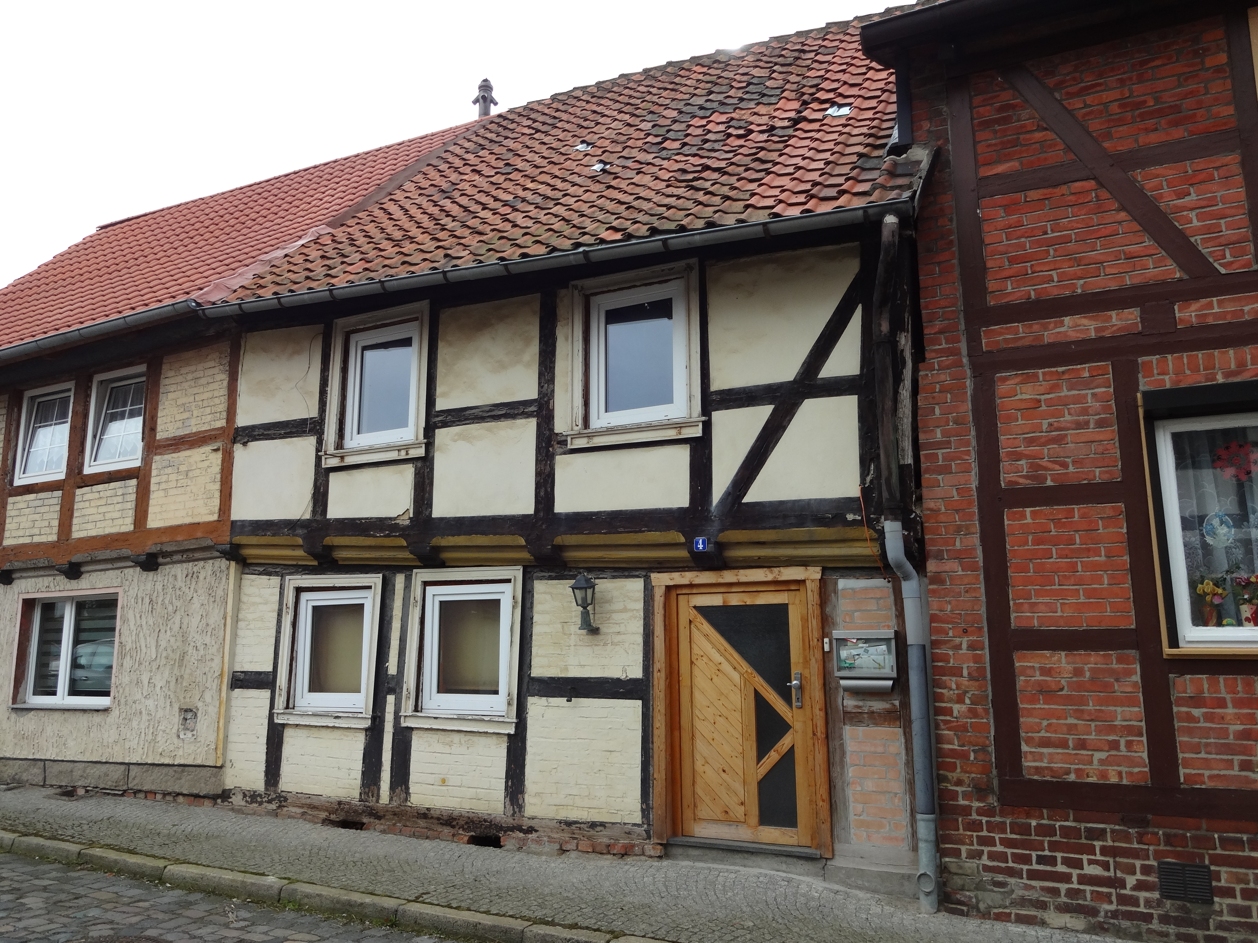 denkmalgeschütztes Fachwerkhaus in der Mittleren Mauerstraße 4 in Derenburg, Ortsteil von Blankenburg (Harz)